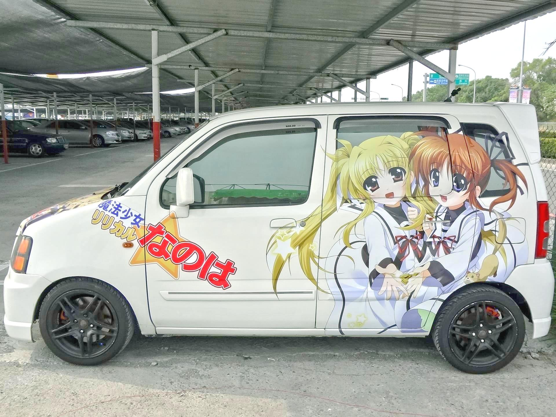 中文（台灣）: 2013臺中動漫節，停在大臺中國際會展中心外的鈴木Solio《魔法少女奈葉》痛車左側外觀。